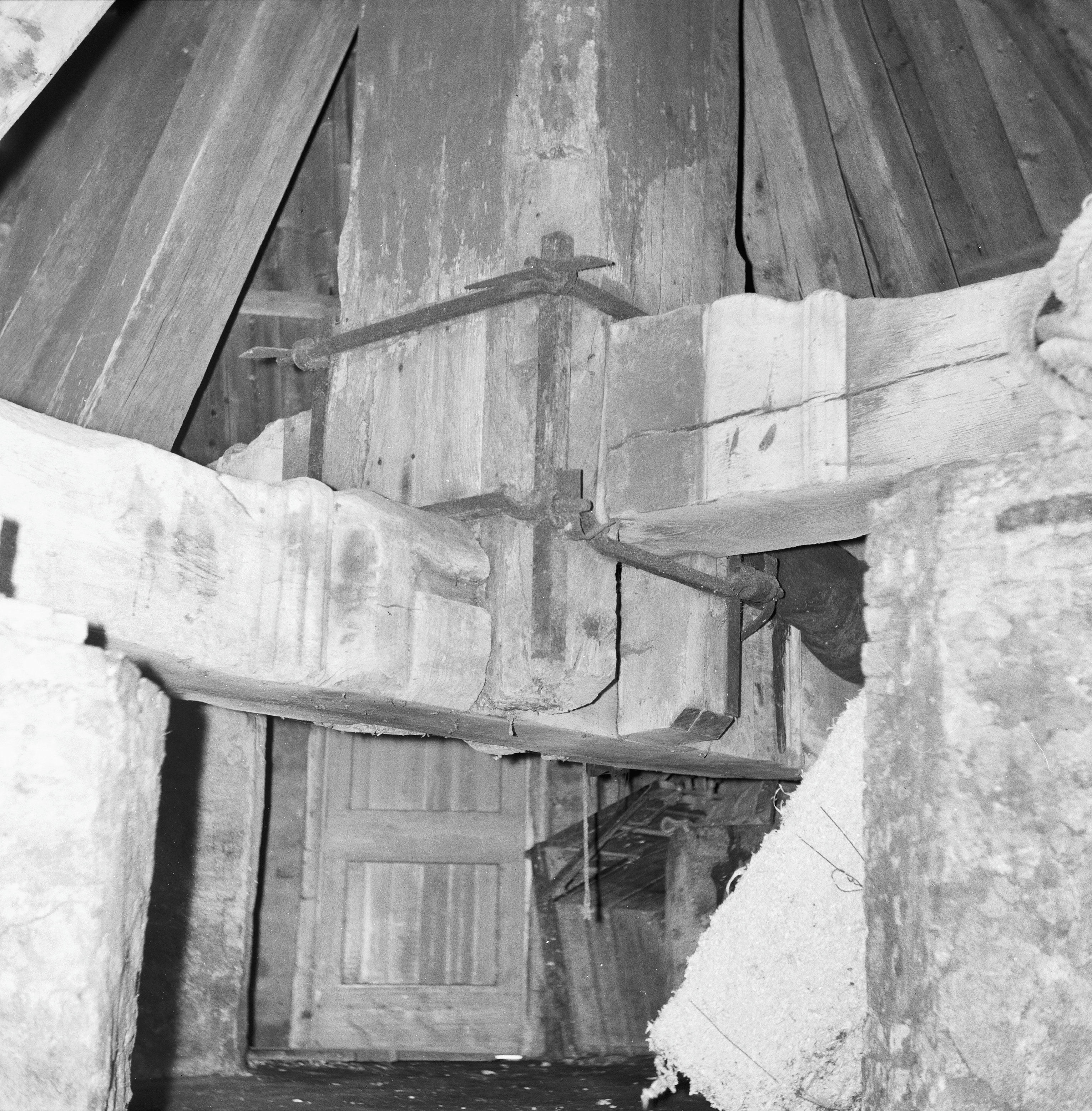 Ten-Bruggencatenummer: 01218: Standerdmolen, stander